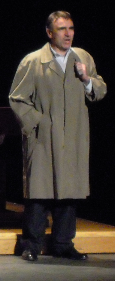 O actor galego Alfonso Agra na representación da obra O florido pénsil, no Pazo da Cultura de Pontevedra